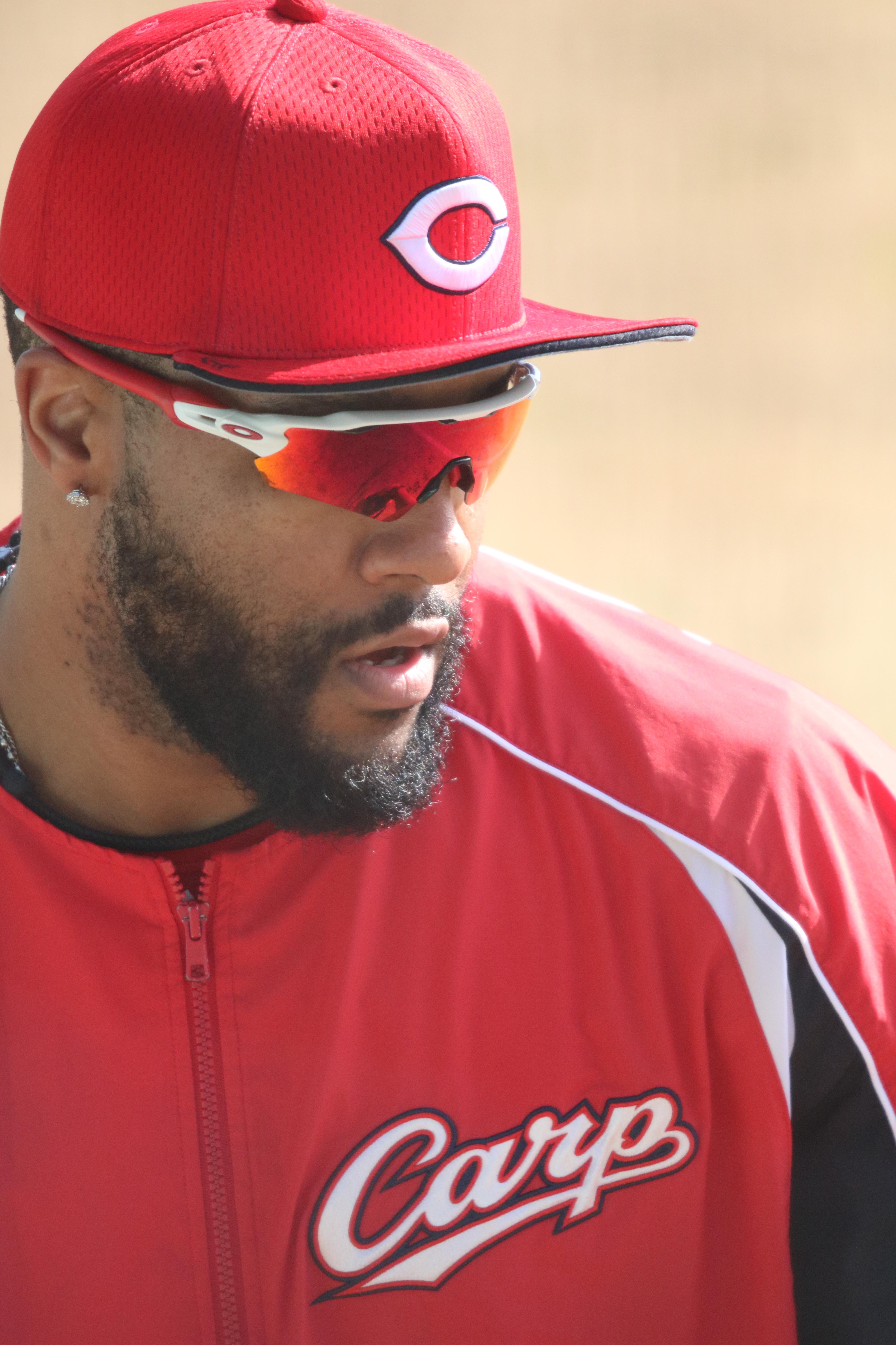 2018/2/11 天福球場